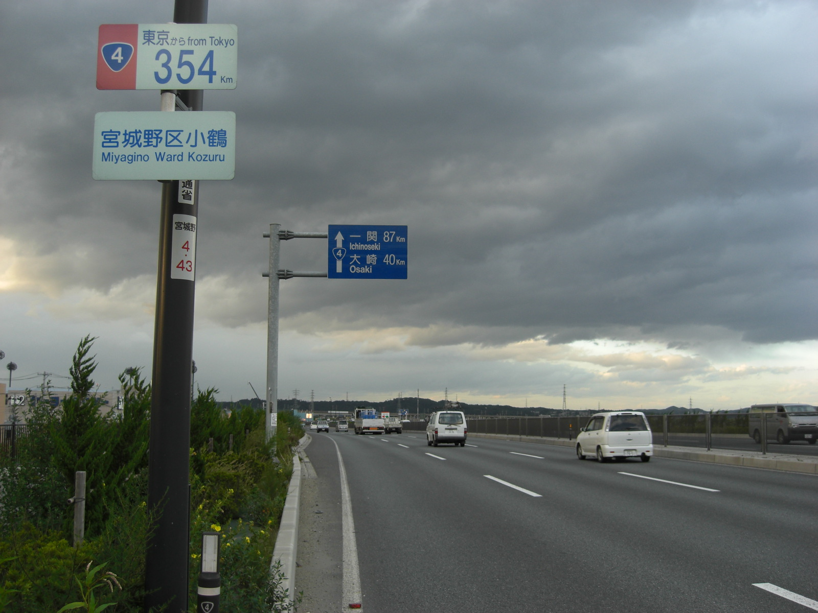 仙台市宮城野区苦竹インター付近